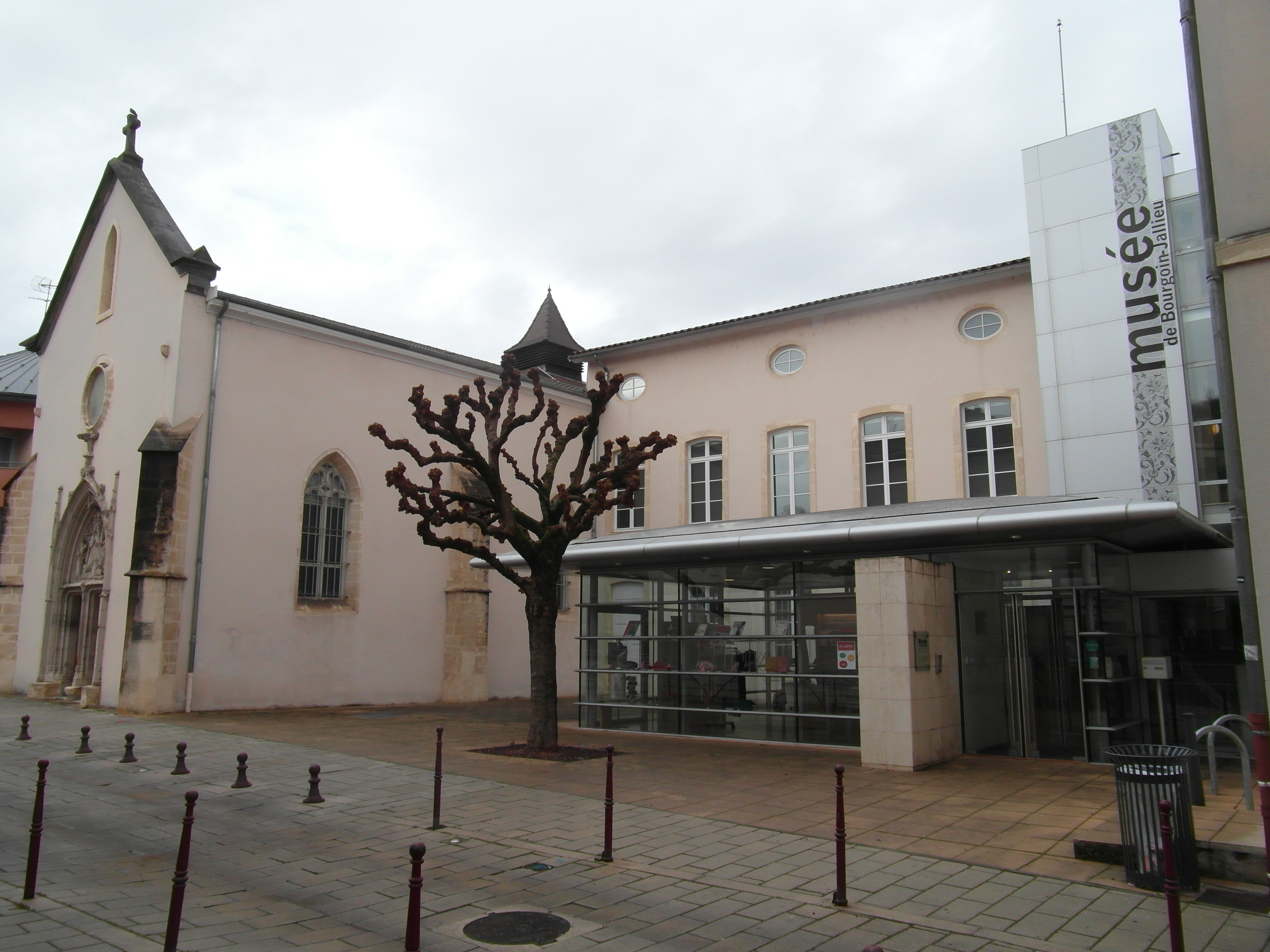 Musée de Bourgoin-Jallieu en février 2019